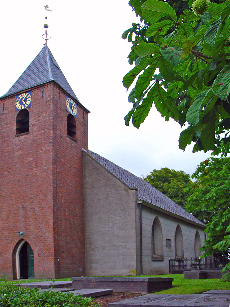 Kerk van Zuurdijk